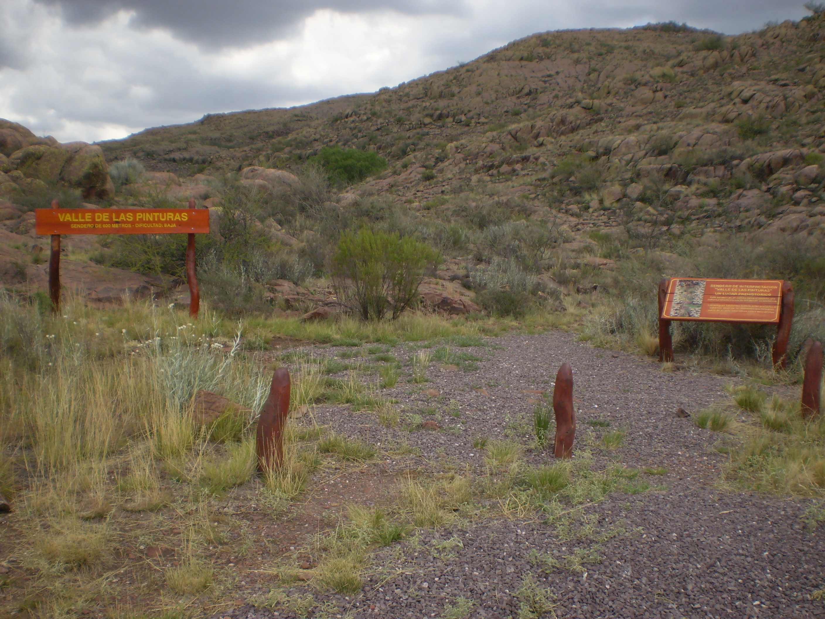 Ingreso al sendero Valle de las Pinturas en el Parque Nacional Lihué Calel, La Pampa, Argentina